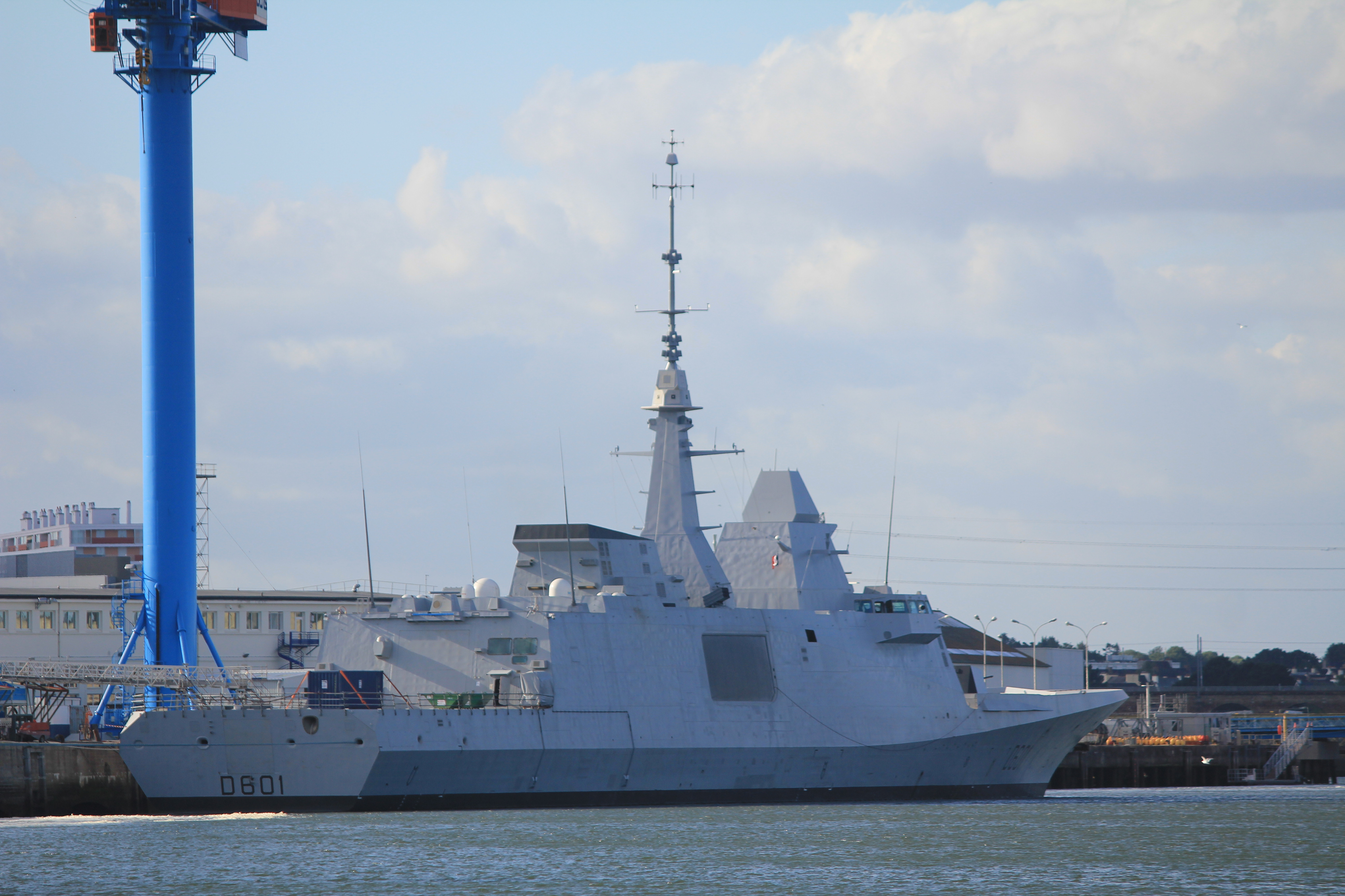 FREMM Mohammed VI en finition de construction à Lorient en mai 2013